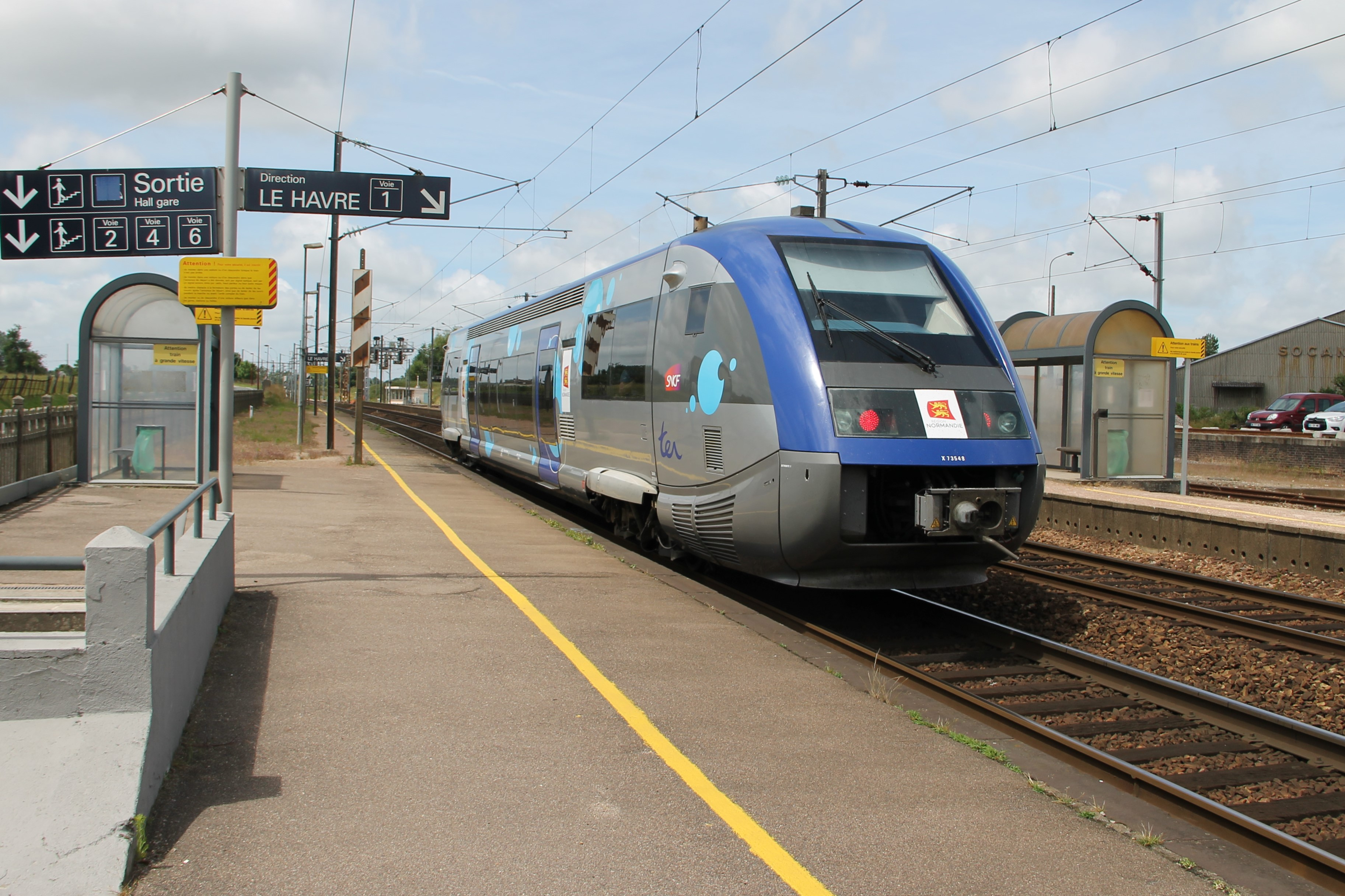 Autorail de type X 73500 assurant un TER entre Rouen et Le Havre, en gare de Motteville, Seine-Maritime, France.